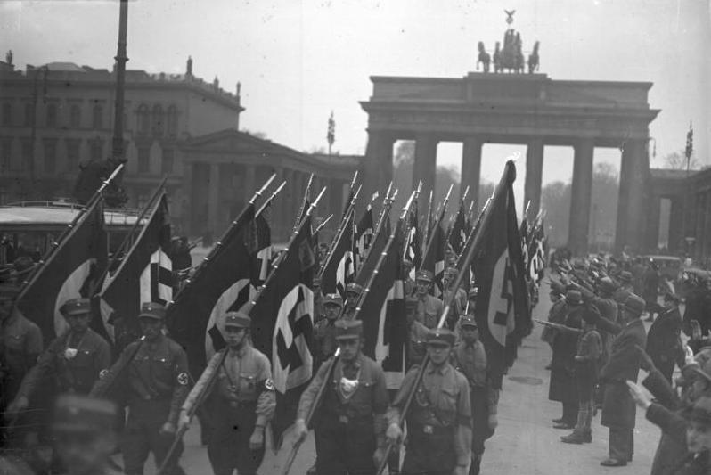 Der große Amtswalter-Appell des Gaues Kurmark in Berlin ! Über tausend Fahnen ziehen durch das Brandenburger Tor. Unter den Linden anläßlich der Amtswalter Kundgebung.